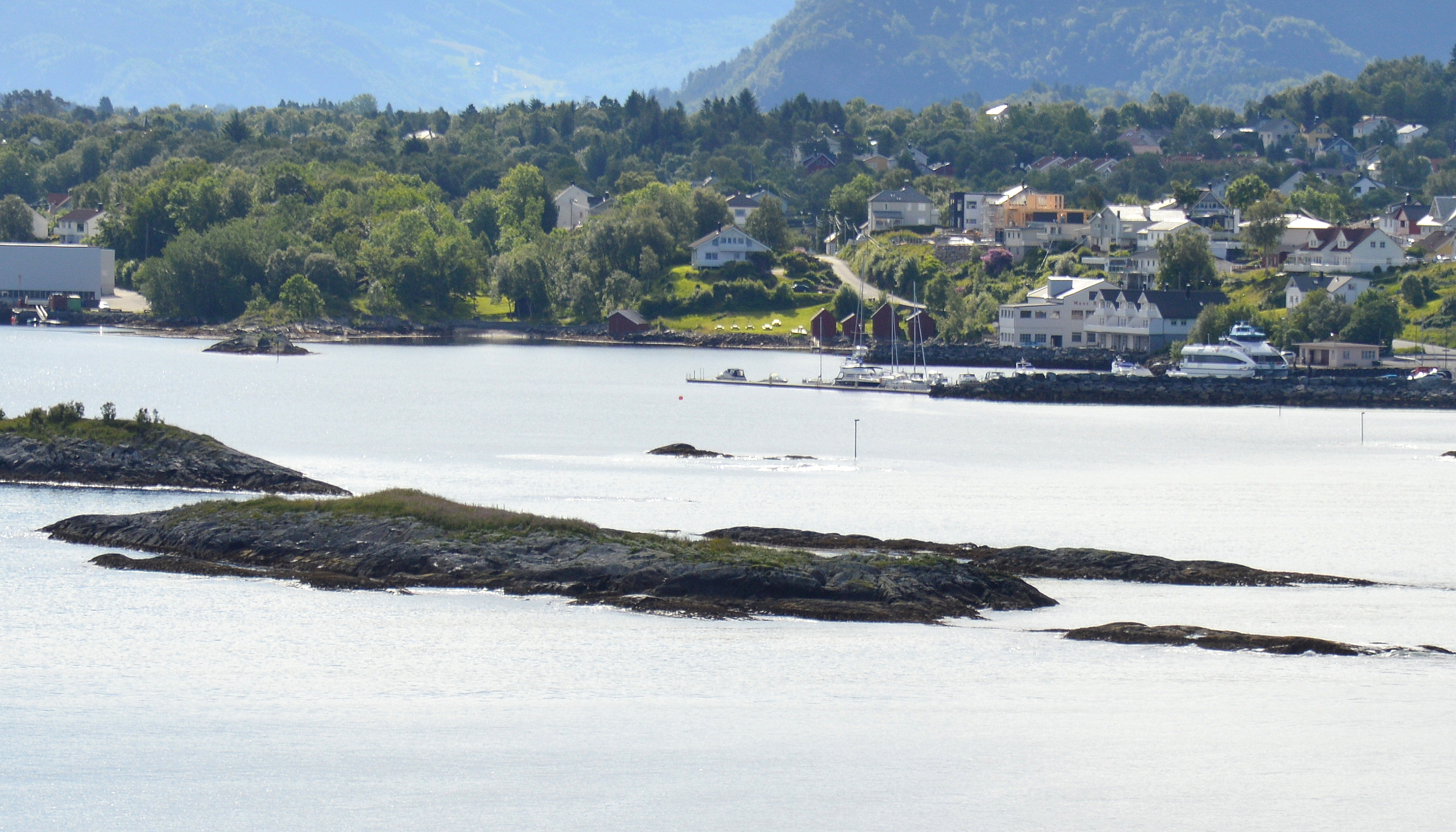 Langedraget, Schäre bei Alesund, Norwegen